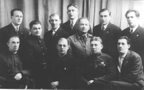 Präsidium des Odessa Fußballschiedsrichterkollegiums. 1937